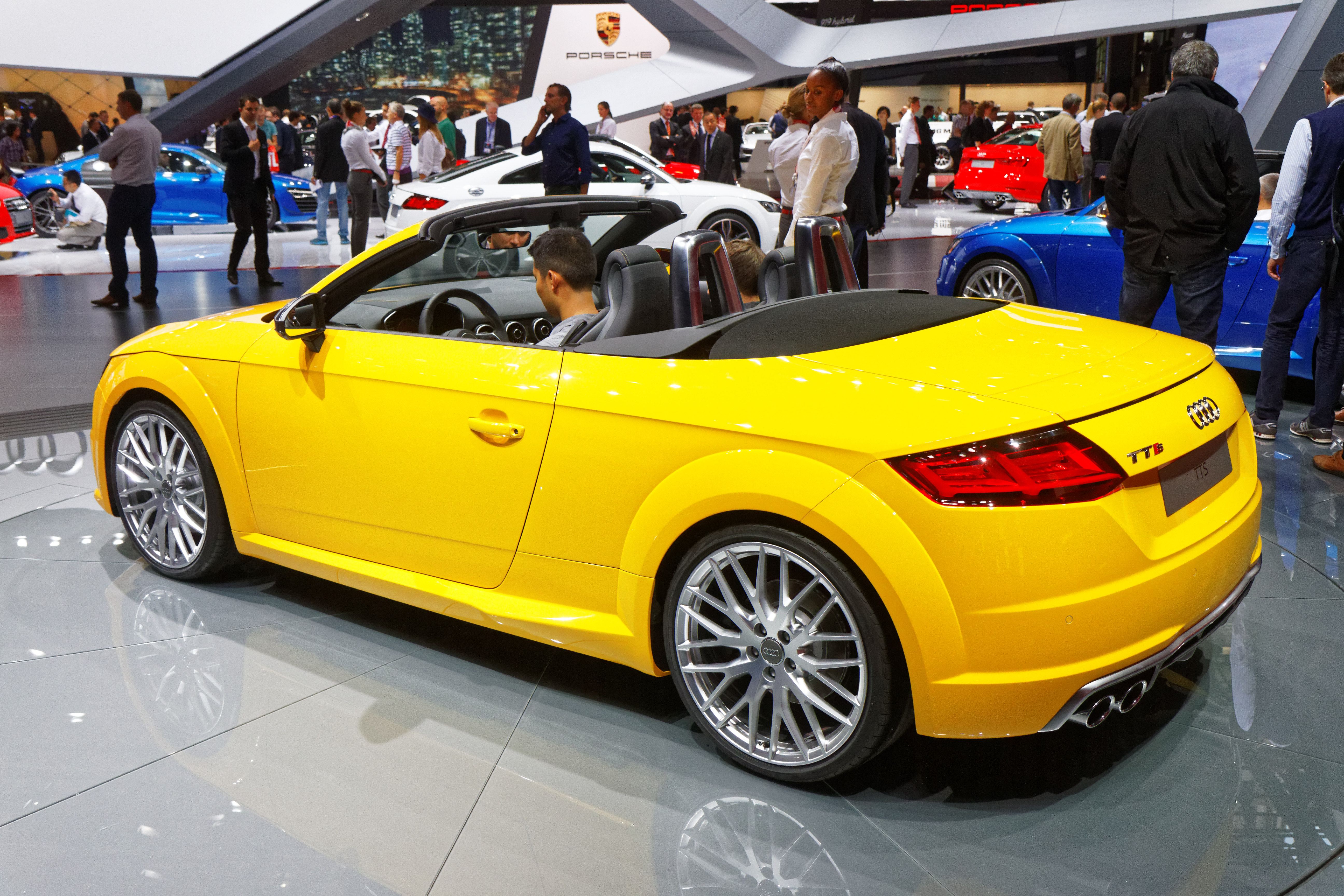 Une Audi TTS présentée lors du mondial de l'automobile de Paris 2014.